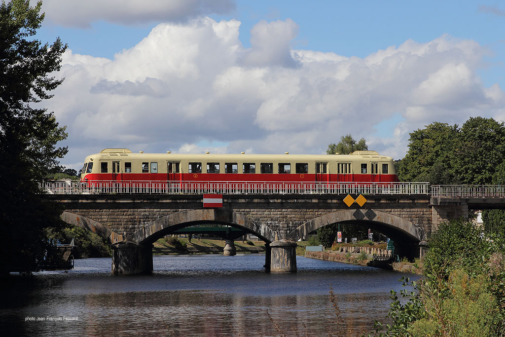 Tour de Bretagne 2013 avec l'X2403